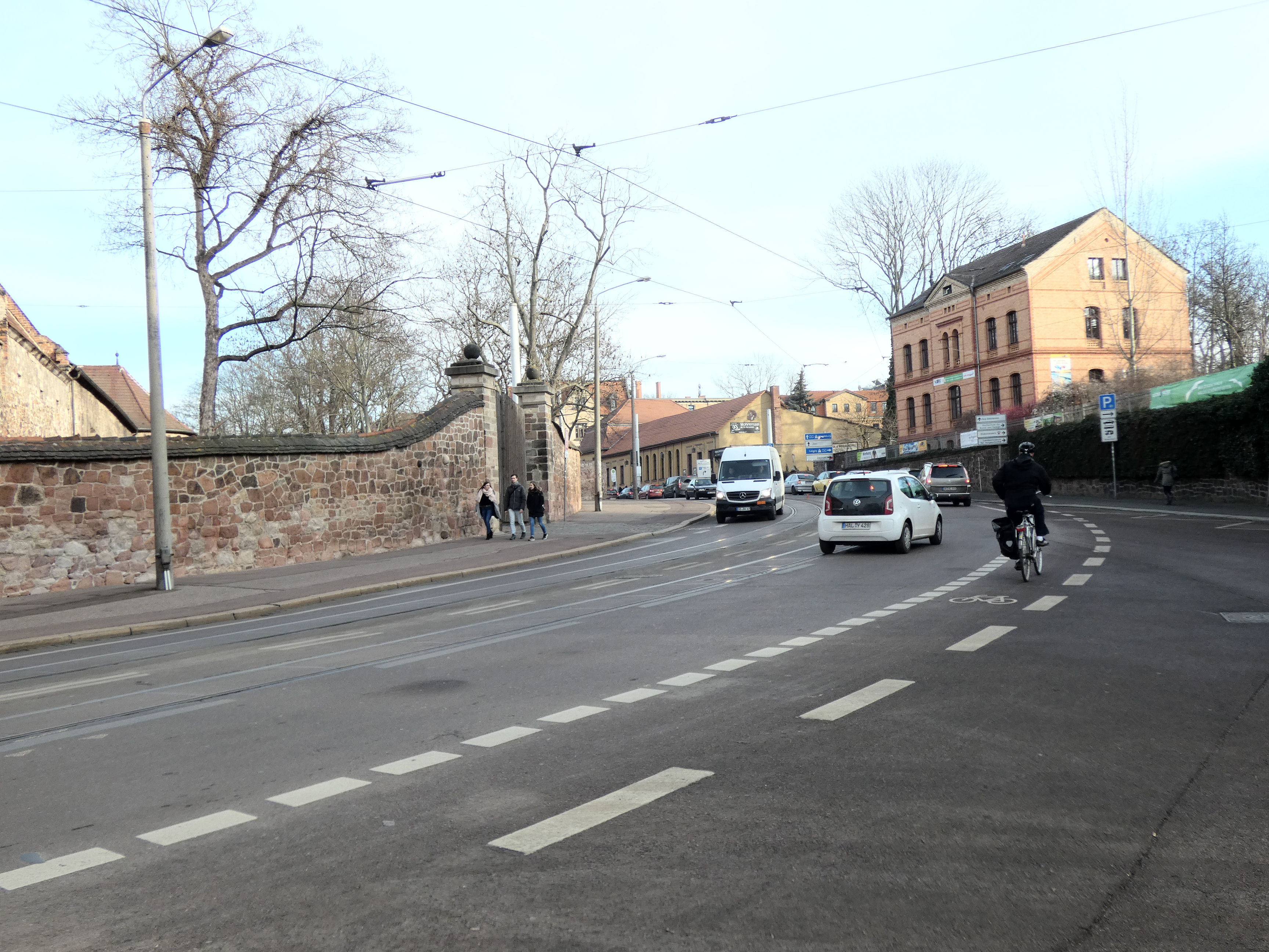 Fährstraße in Halle (Saale)